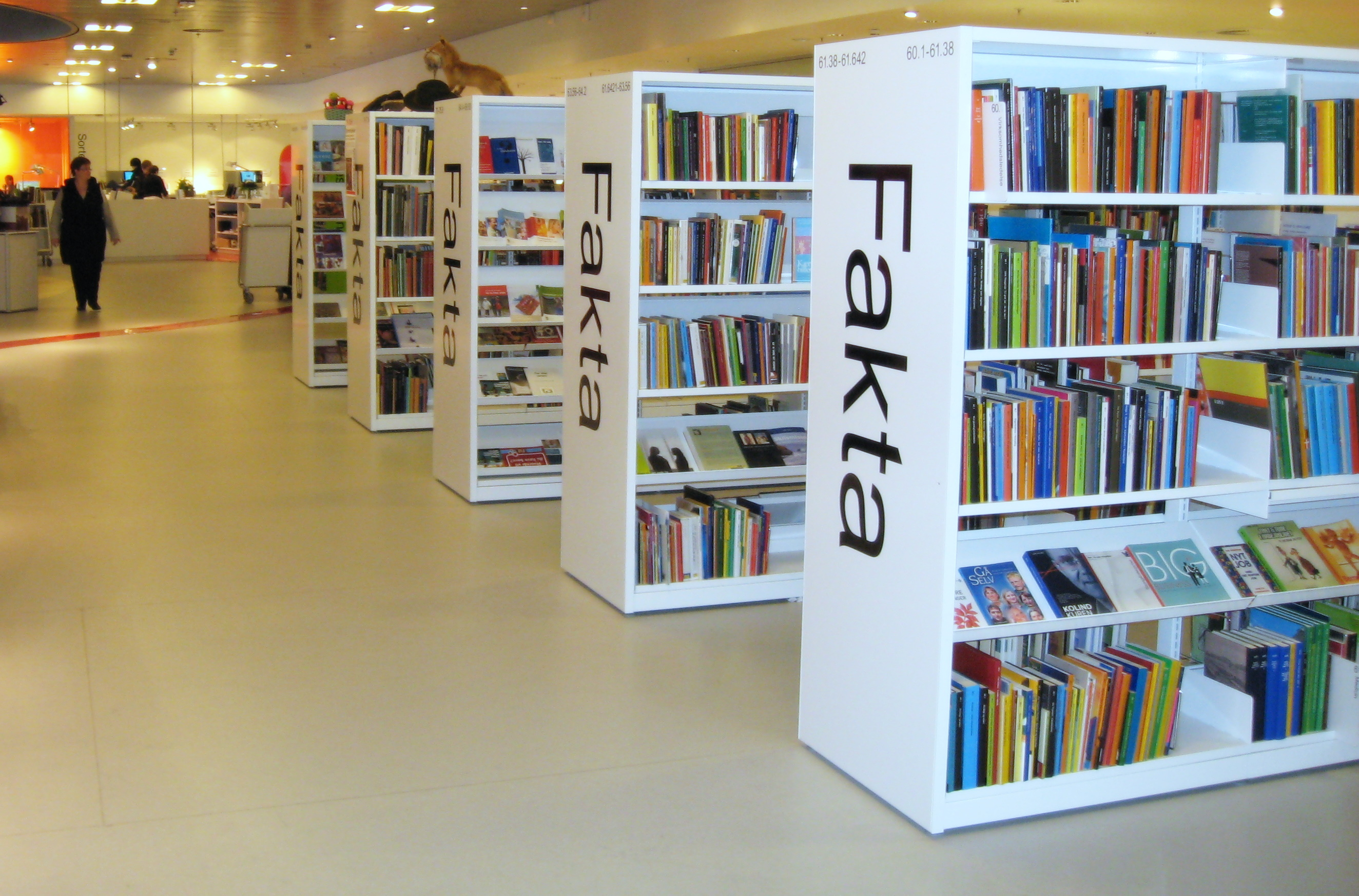 Fakty / Fakta / Facts